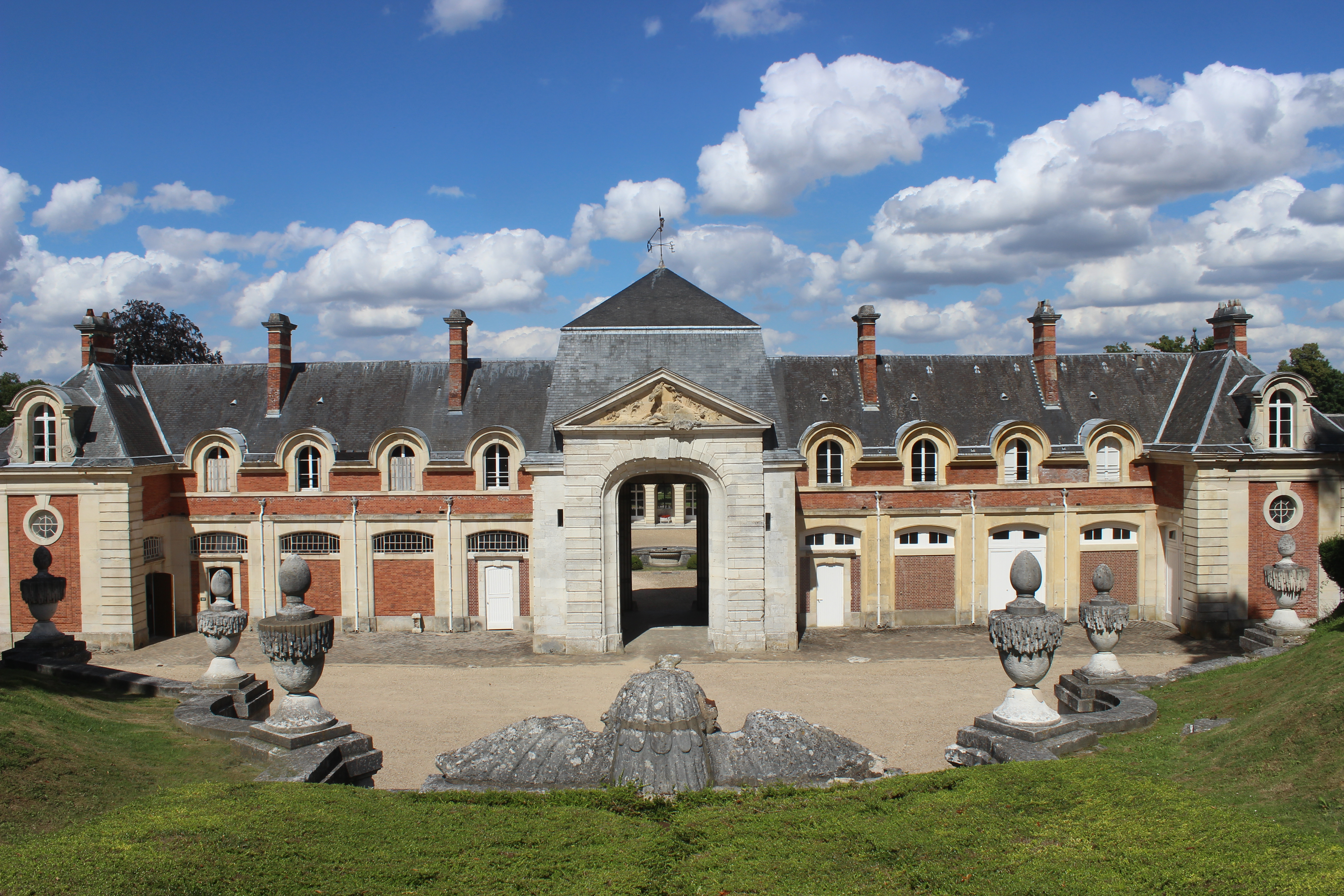 Vernon. Château de Bizy. Exterior.